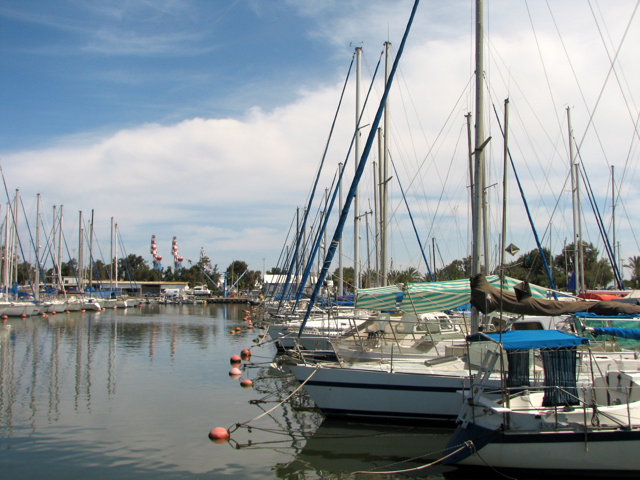 The fishing dock at the port of Kishon serves fishermen and boats and a tourist gateway to the Park Kishon. "Yacht harbor" מעגן הדיג ליד נמל הקישון משרת דייגים ובעלי ספינות וכן מהווה שער לאתר התיירות "פארק הקישון".ומעגן יכטות